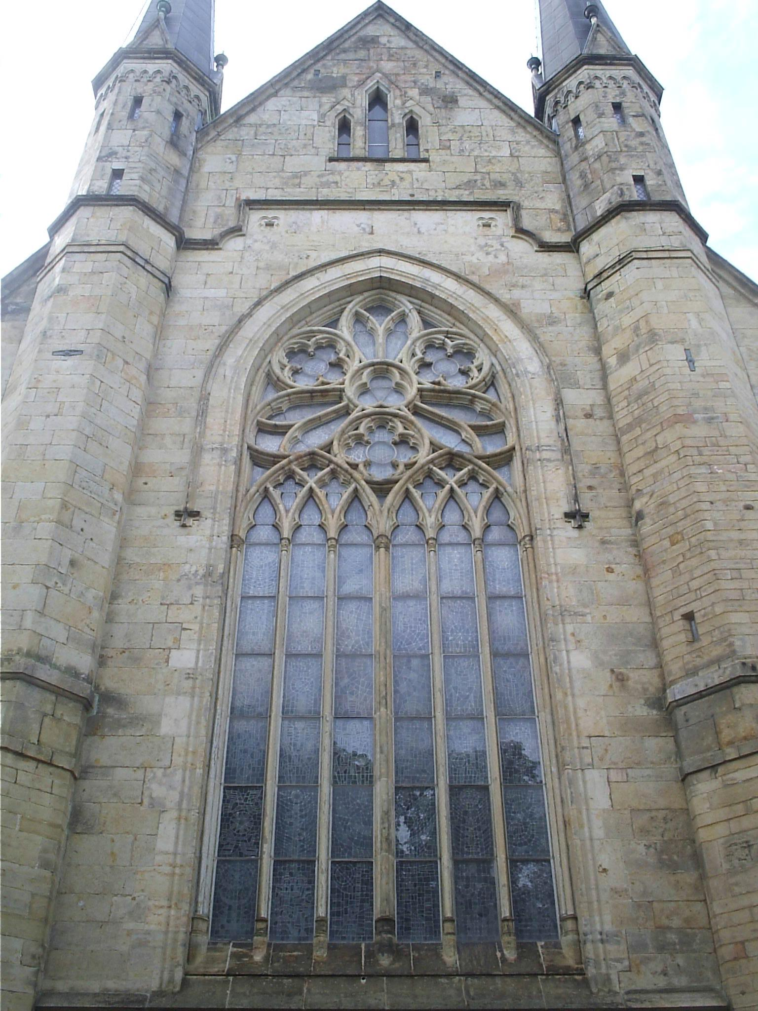 Skara domkyrka